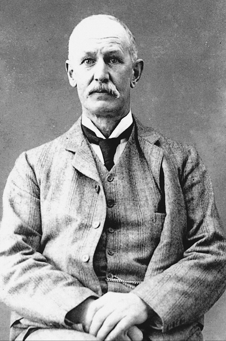 Daniel John Cunningham